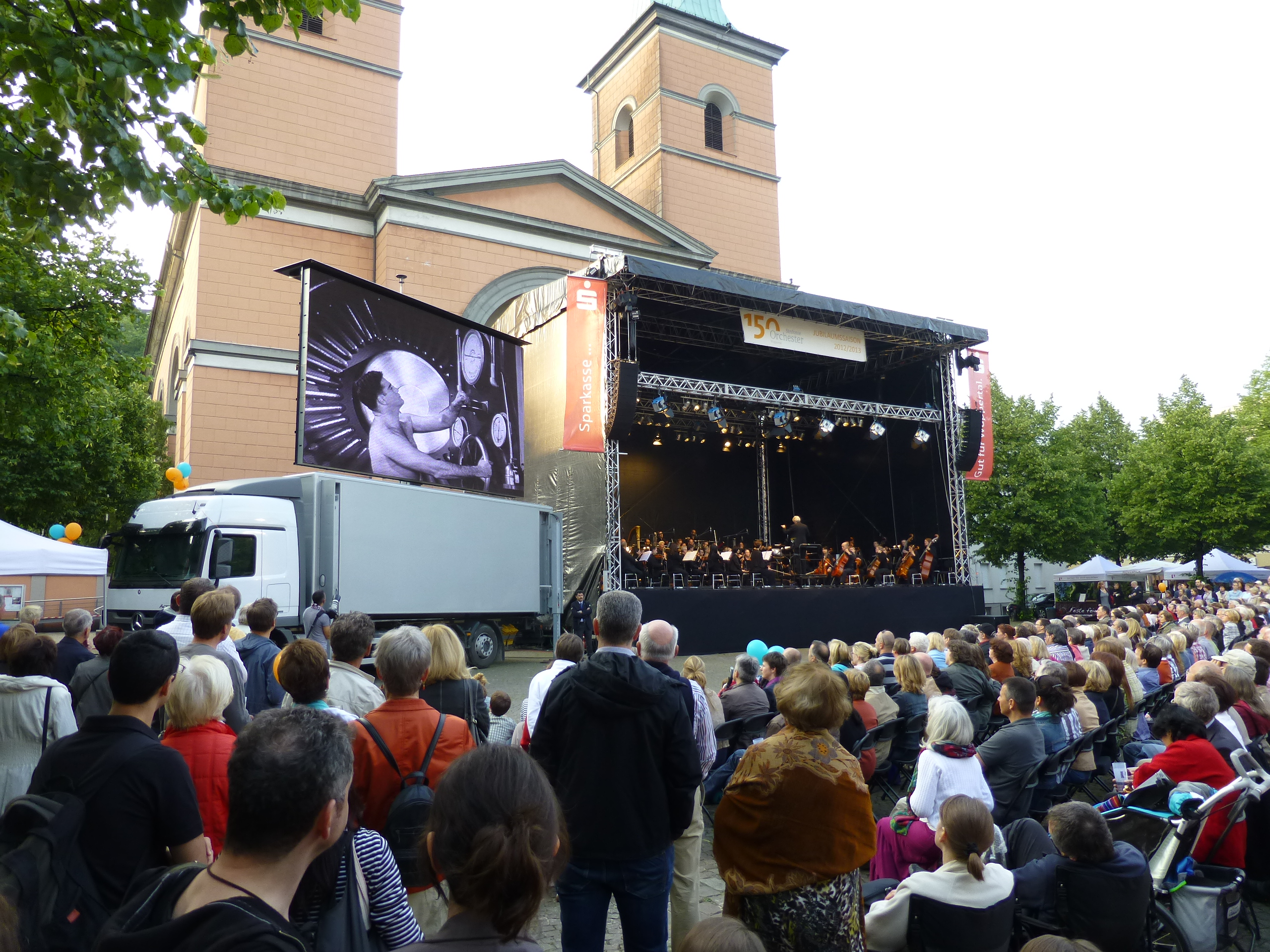 Open-Air-Konzert des Sinfonieorchester Wuppertal am 12. Juli 2013 ab 20:00 auf dem Laurentiusplatz, Wuppertal. Geboten wurde Stummfilm & Livemusik, Charlie Chaplin: "Modern Times"